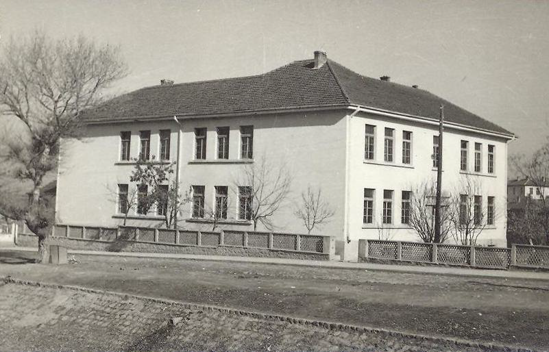 Старата зграда на Гимназијата, денешно ОУ “Страшо Пинџур“